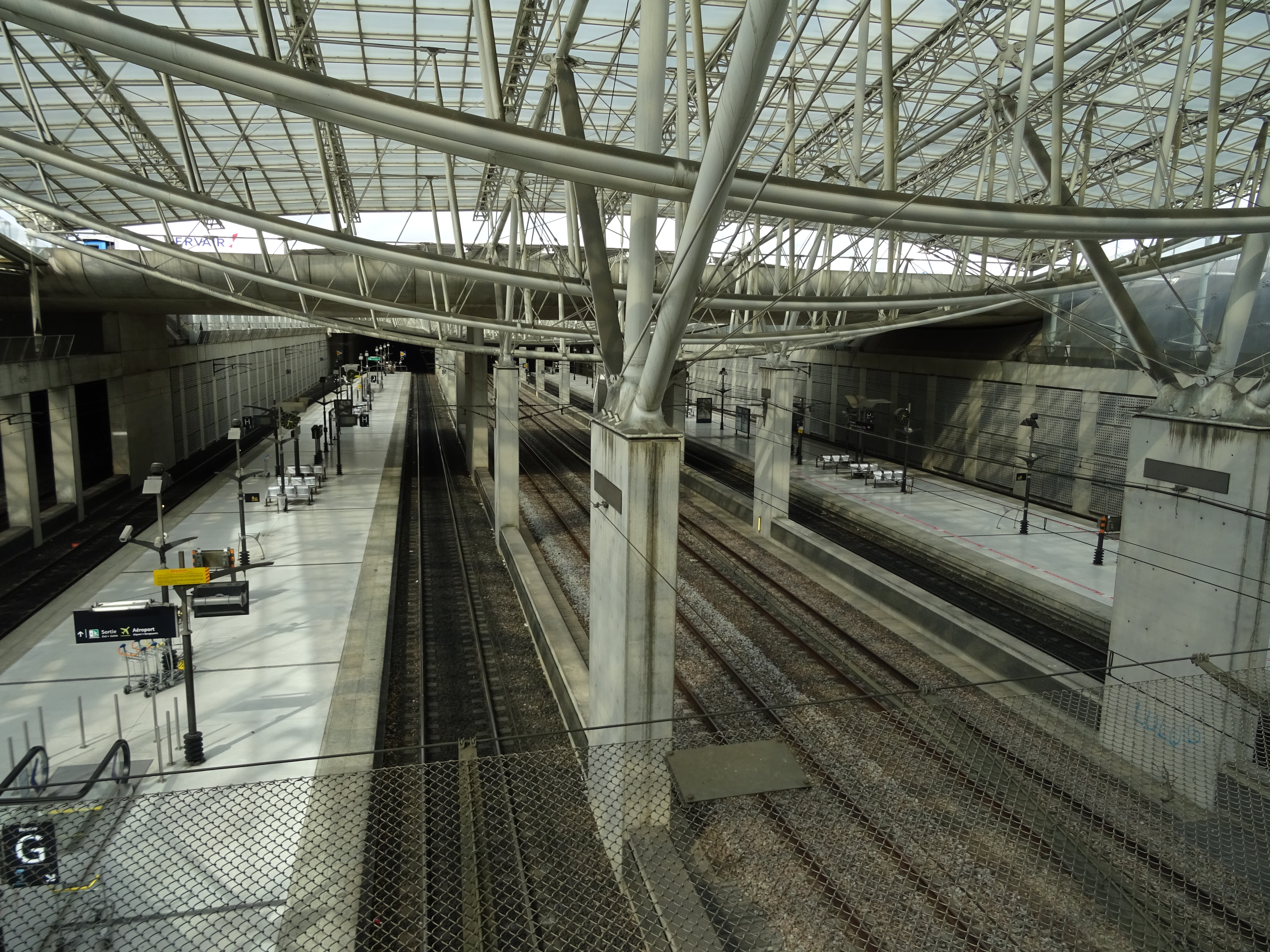 Quais TGV de la gare de l'Aéroport CDG 2